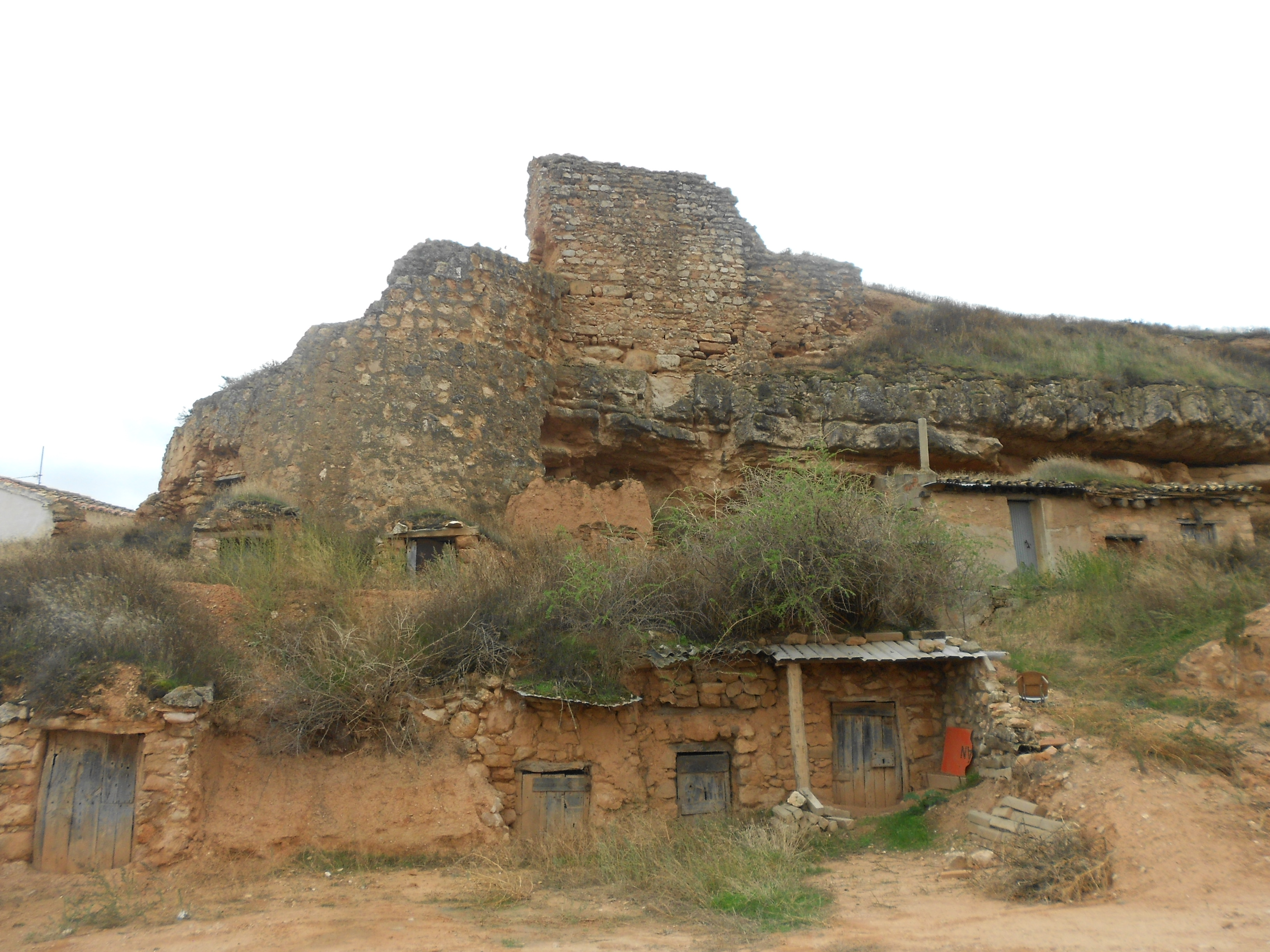 Restos del Castillo de Ariza (Aragón, España).